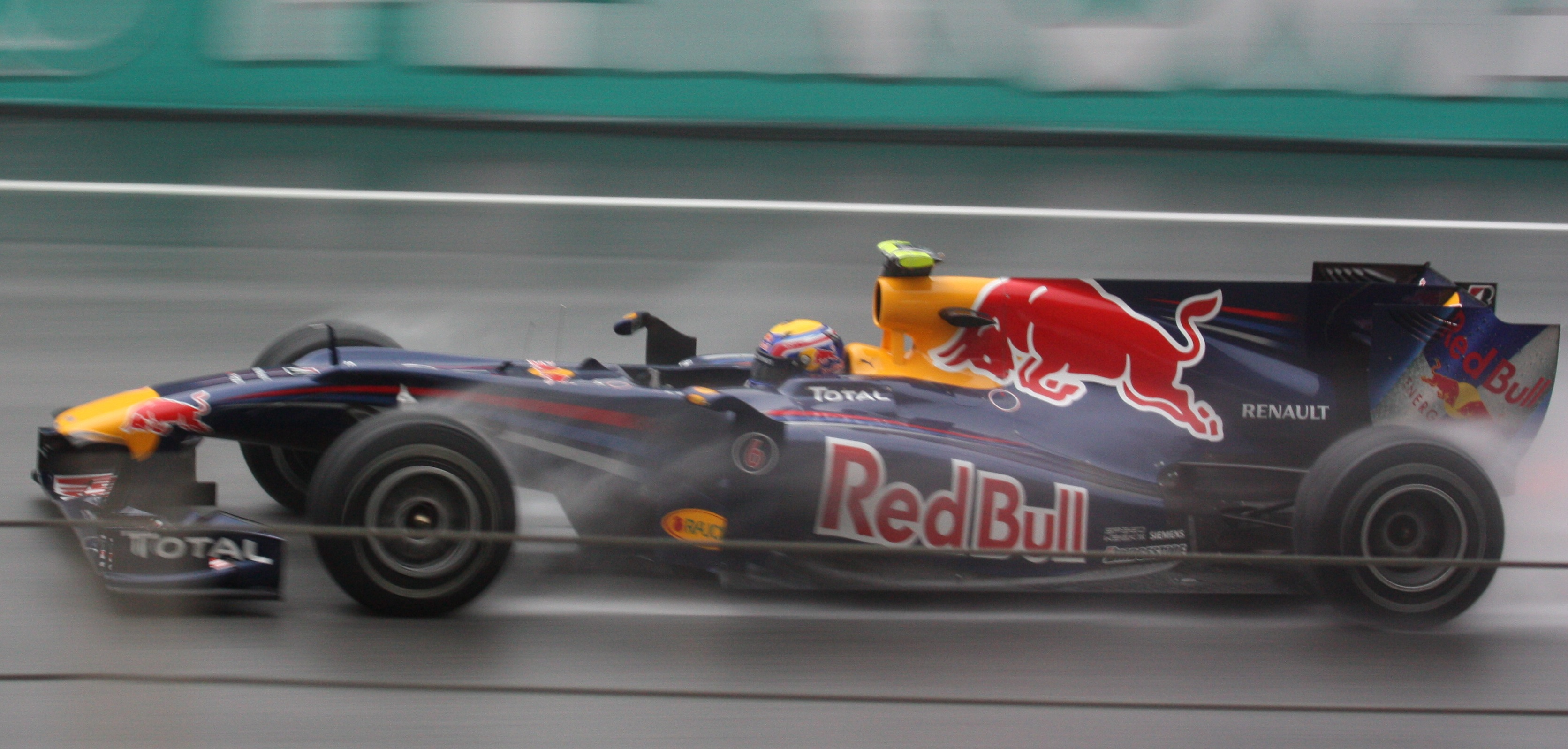 Webber Malaysia